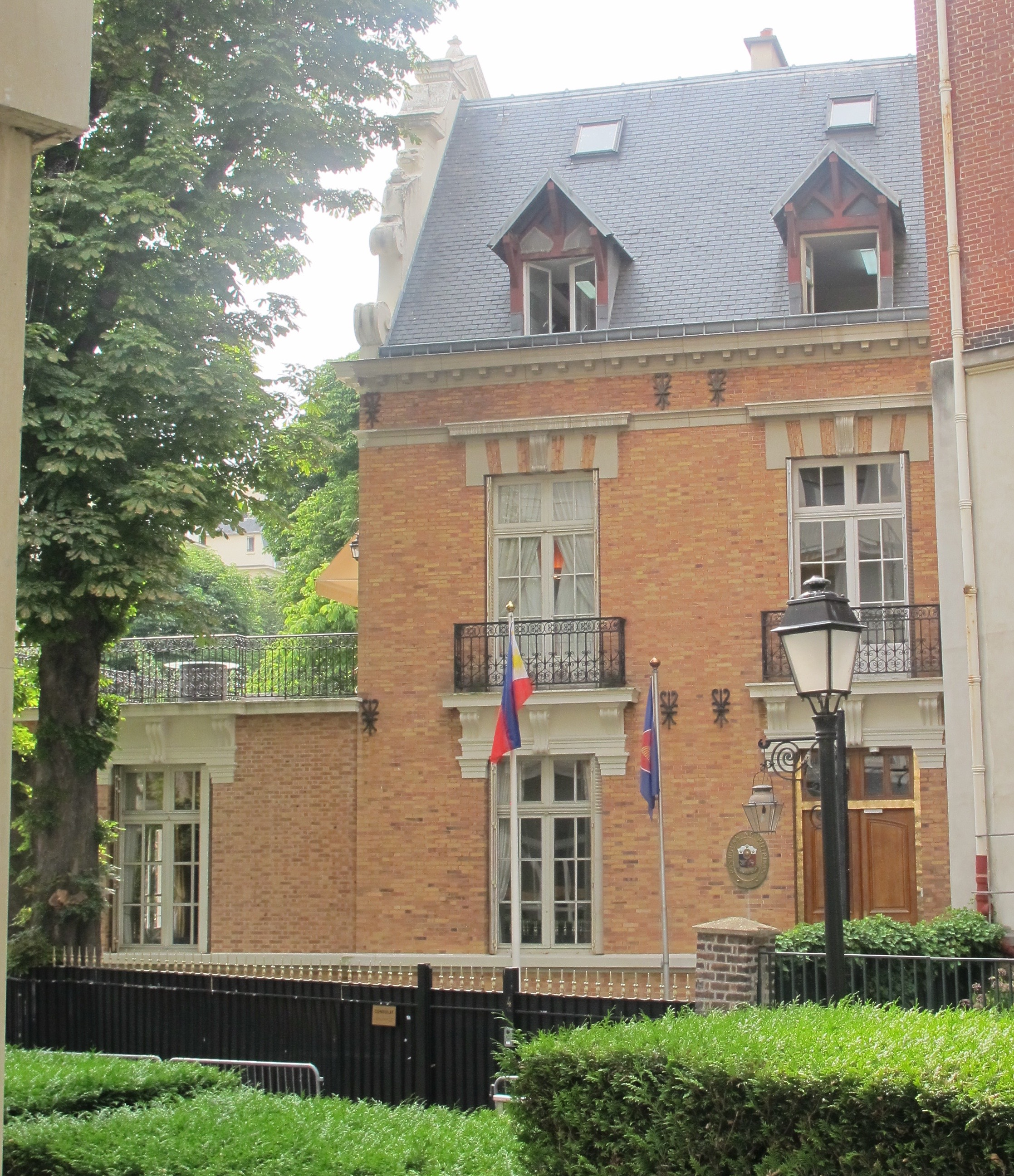 Ambassade des Philippines en France, n°4 hameau de Boulainvilliers (n°45 rue de Ranelagh), Paris, 16e.